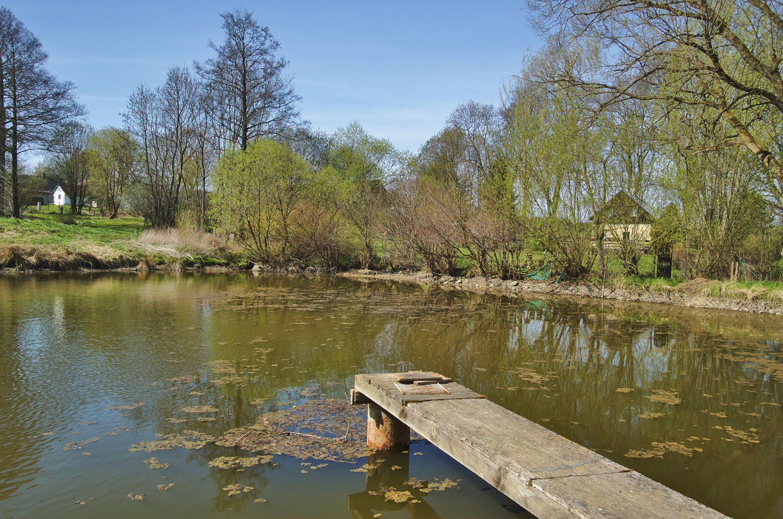 Rybník, Brná, Věžná, okres Pelhřimov Project: Fotíme Česko